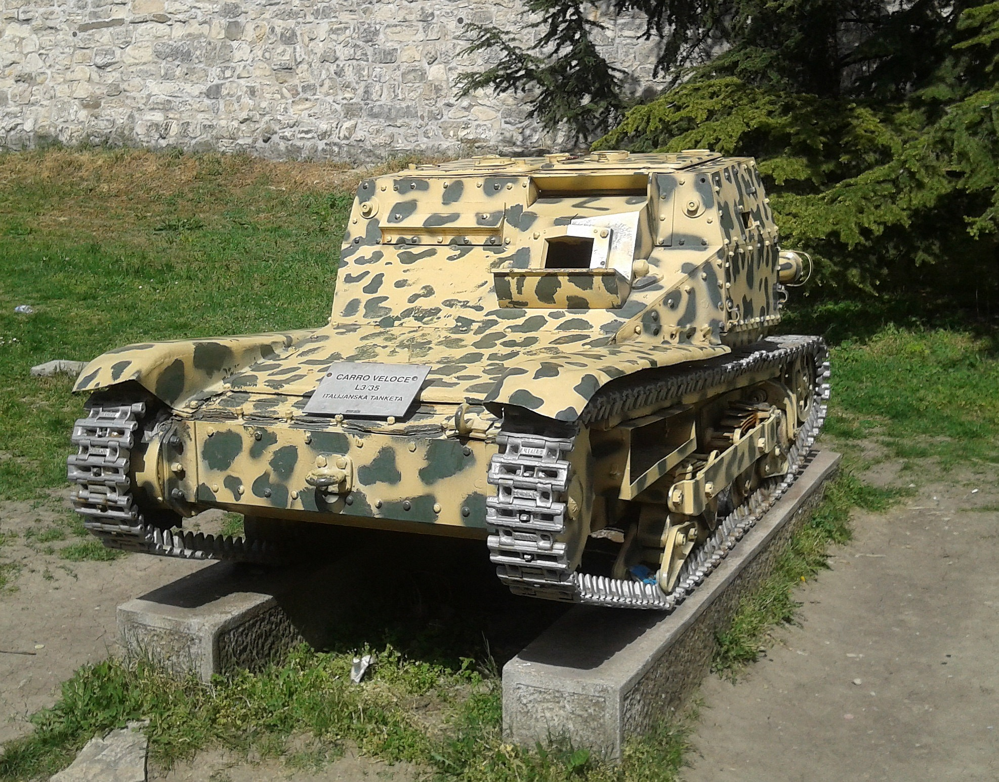 Panzer (L3-35 Carro Veloce) in der frei zugänglichen äußeren Ausstellung des Militärmuseums Belgrad (Serbien)